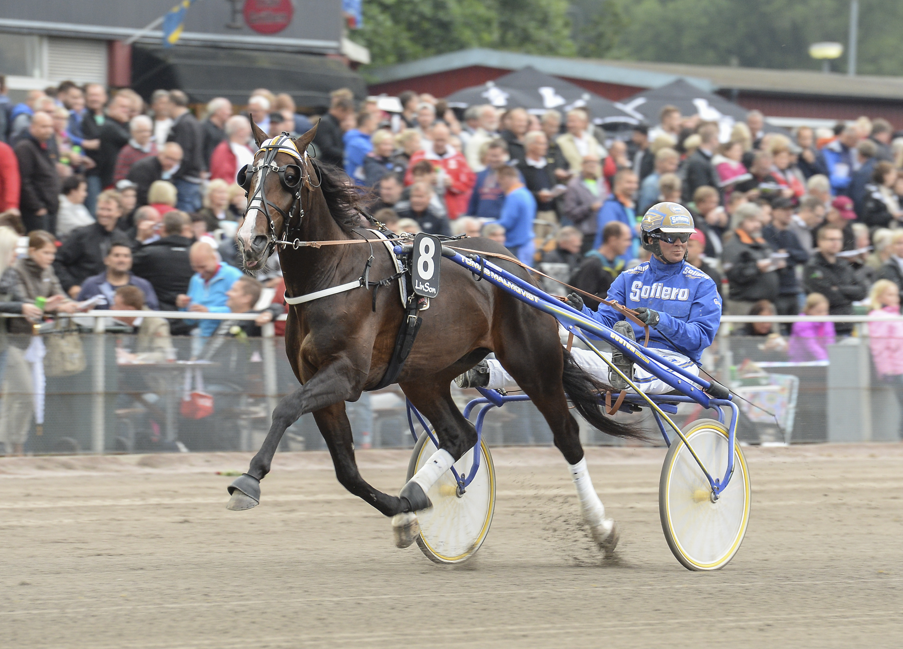 Kusken Björn Goop och travaren Tumble Dust.